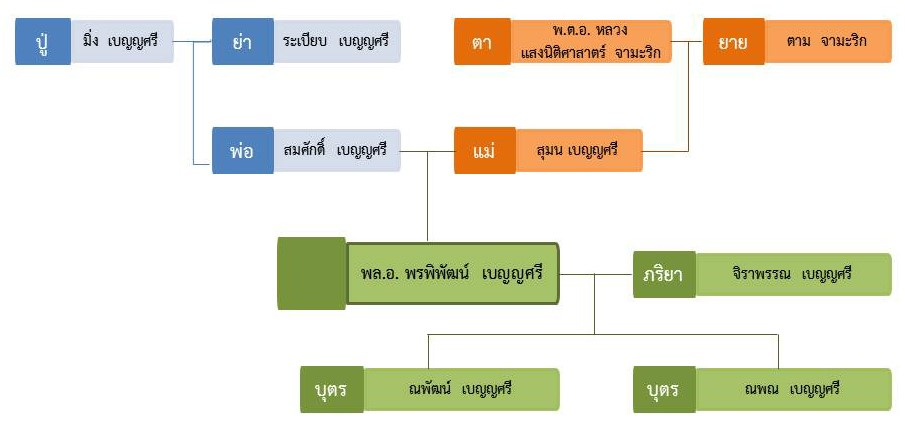 ผบ.ทสส.